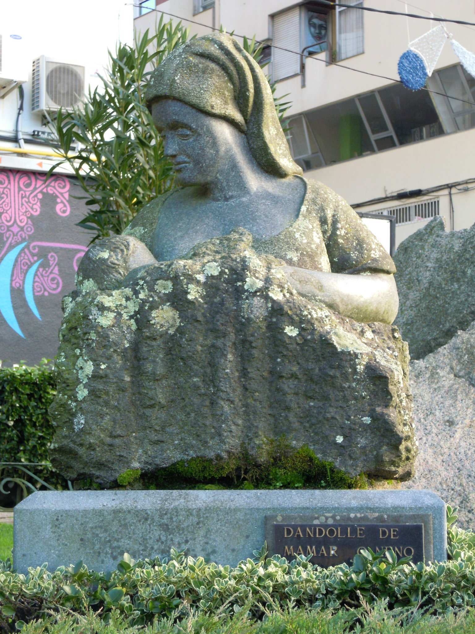 Dándolle de mamar ao neno, estatua no parque da Fontevella, no Porriño